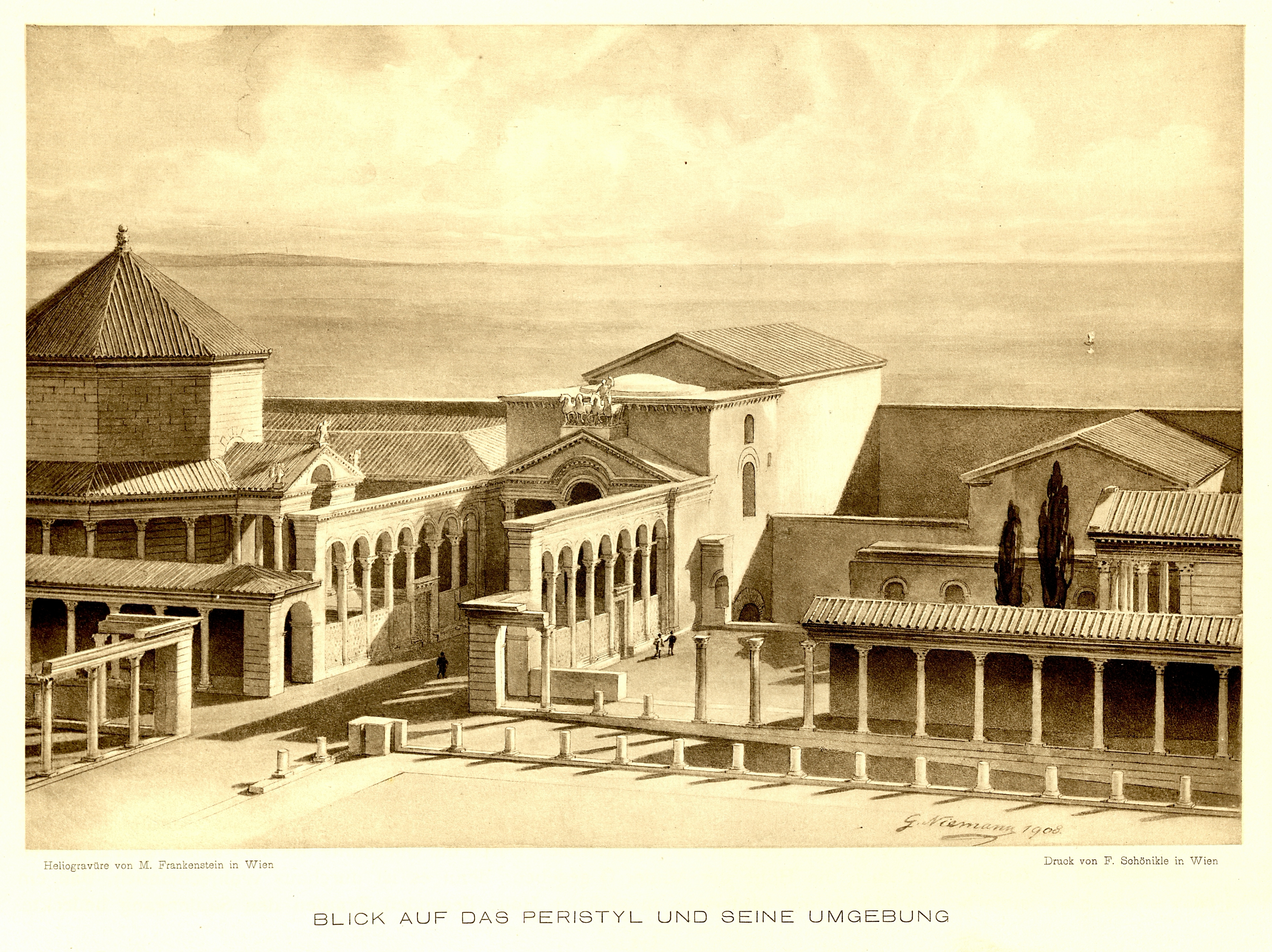 Der Palast Diokletians in Spalato K. K. Österreichisches Archäologisches Institut Im Auftrage des K.K. Ministeriums für Kultus und Unterricht. Ausgenommen und beschrieben von George Niemann 23 Lichtdrucktafeln, 162 Textabbildungen und Initialen Verlag: Alfred Hölder, Wien